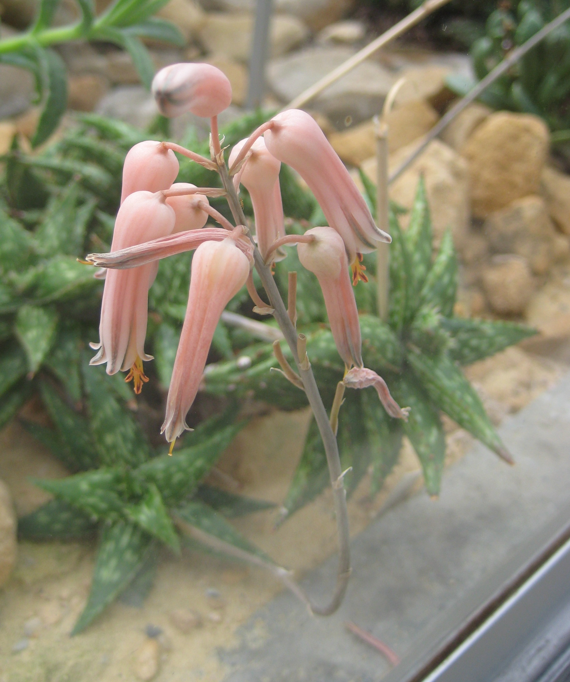 Aloe jucunda im Botanischen Garten Dresden